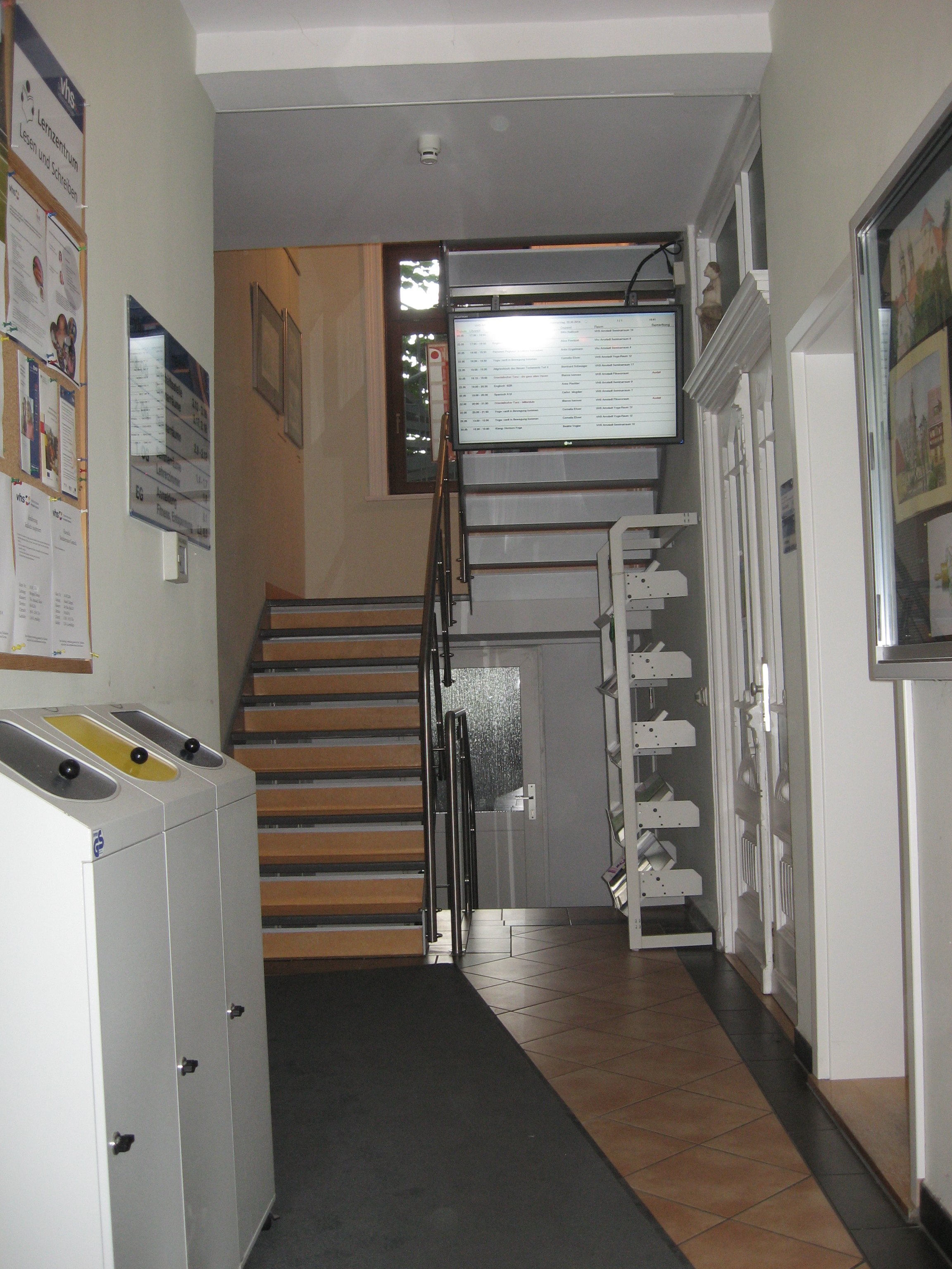 Eingang der Volkshochschule in Arnstadt